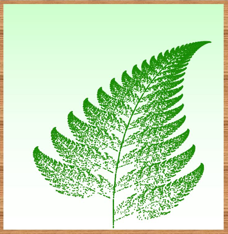 バーンズリーによって見出されたシダの形状を示すフラクタル図形、反復関数系（IFS：Iterated Function System）の例。